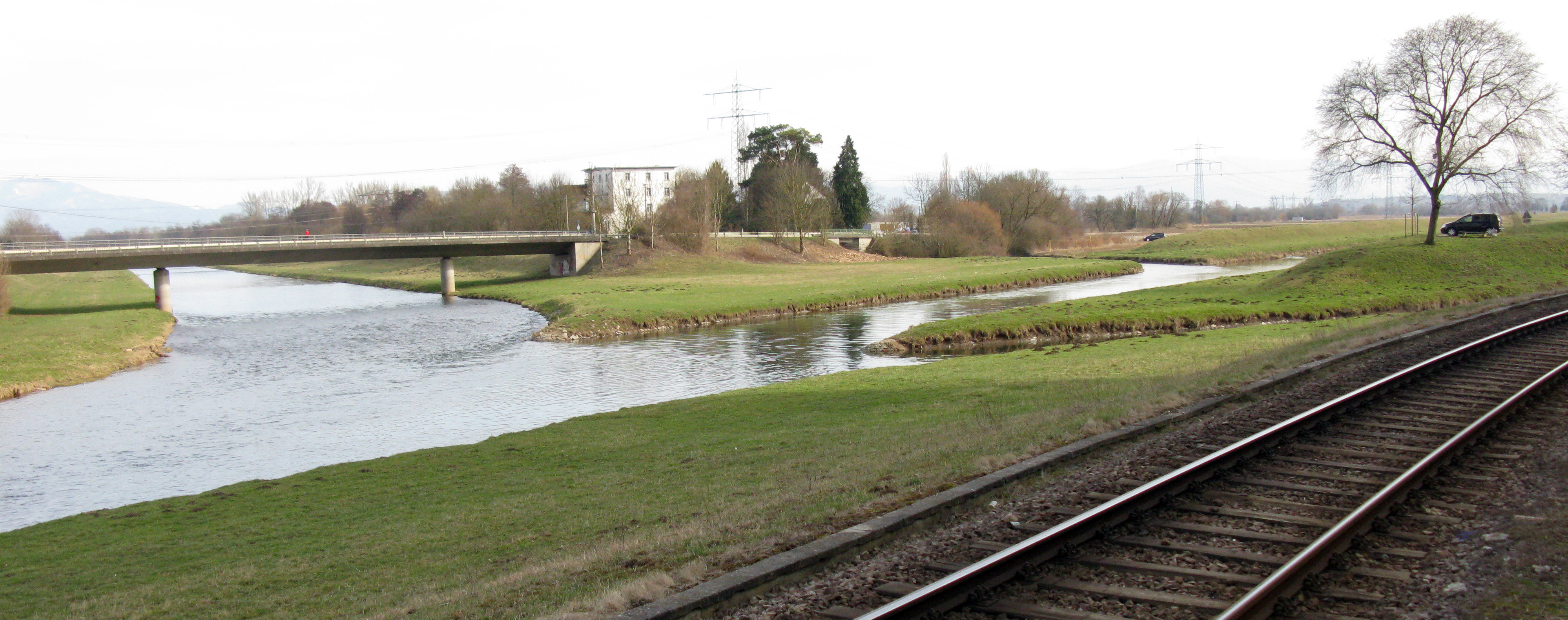 Zusammenfluss von Elz, Glotter, Dreisam und Alter Dreisam (v.l.n.r.) in Riegel, im Vordergrund die Gleise der Kaiserstuhlbahn Richtung Bahlingen